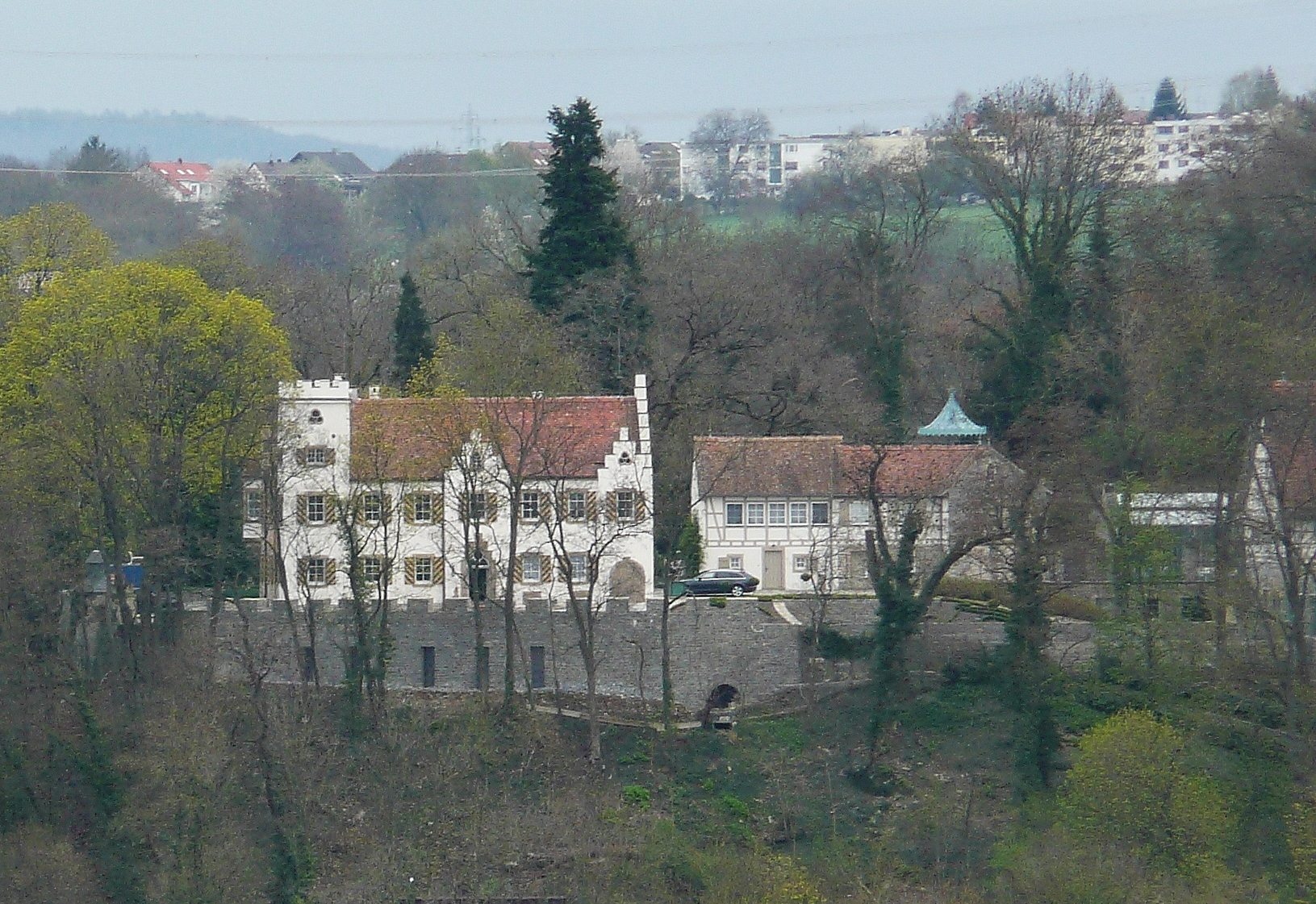 Neckargröningen: Blick auf Schloss Remseck, erbaut 1540, mit Atelier Gisela Ade